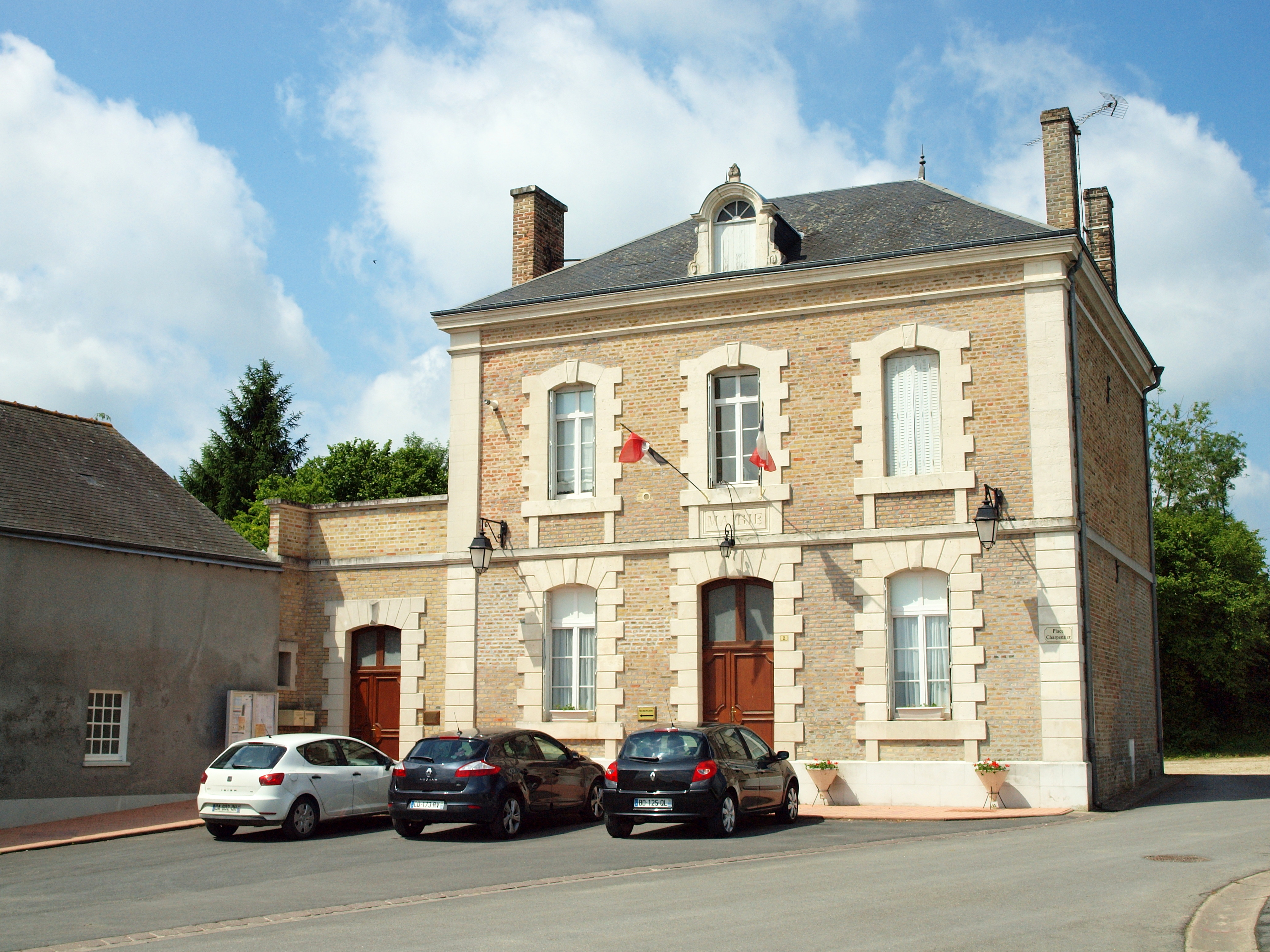 Mairie de Biermes (Ardennes, France)